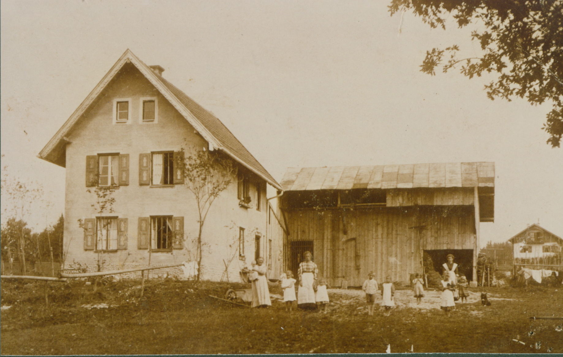 Feldafing, ehemaliges Haus Nummer 125, heute Wielinger Straße 28, erbaut 1904, nach 2000 abgerissen und wiederaufgebaut. Hier wohnte vom 01.02.1916 bis 01.10.1926 der Dichter Bruno Frank, ab 1924 mit seiner Frau Liesl Frank geb. Pallenberg. Foto: 1909 bis 1914.